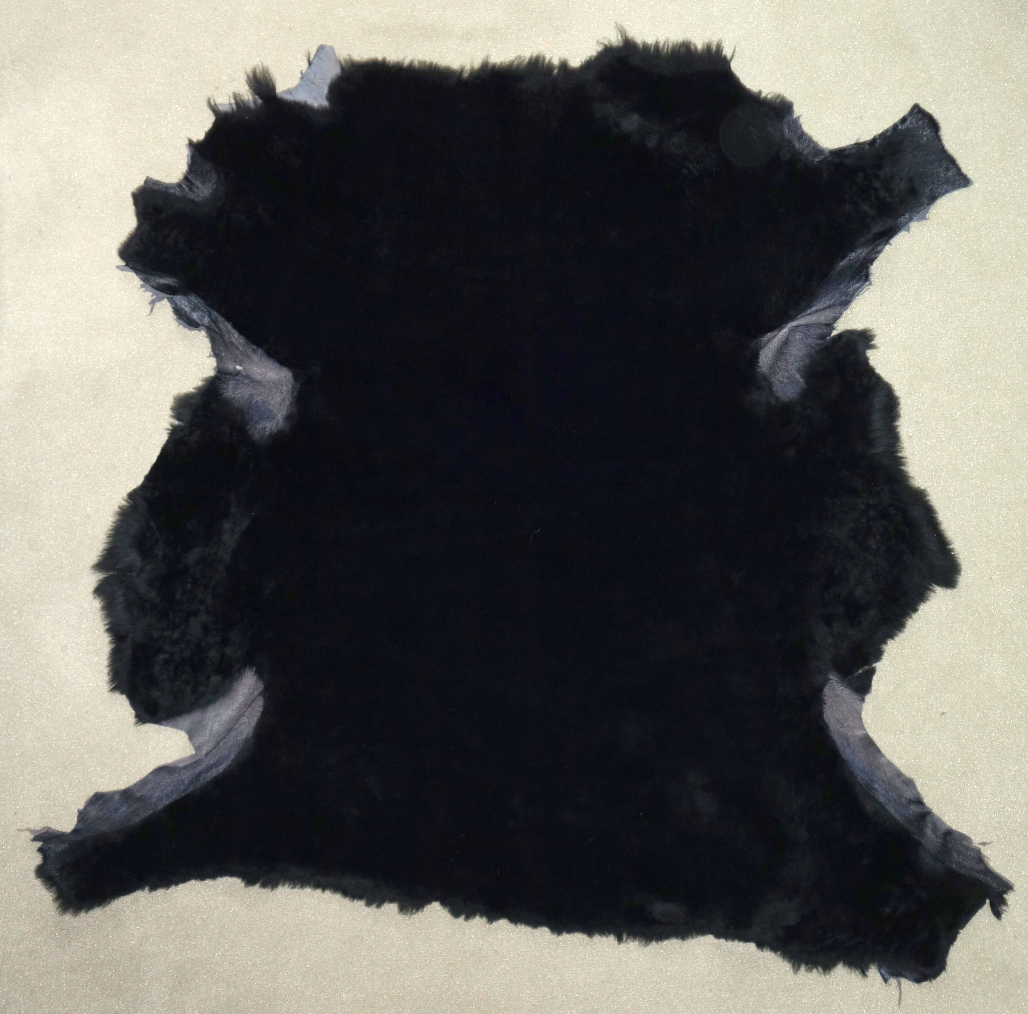 Schwarzgefärbtes Biberlammfell. 74 Zentimeter lang.